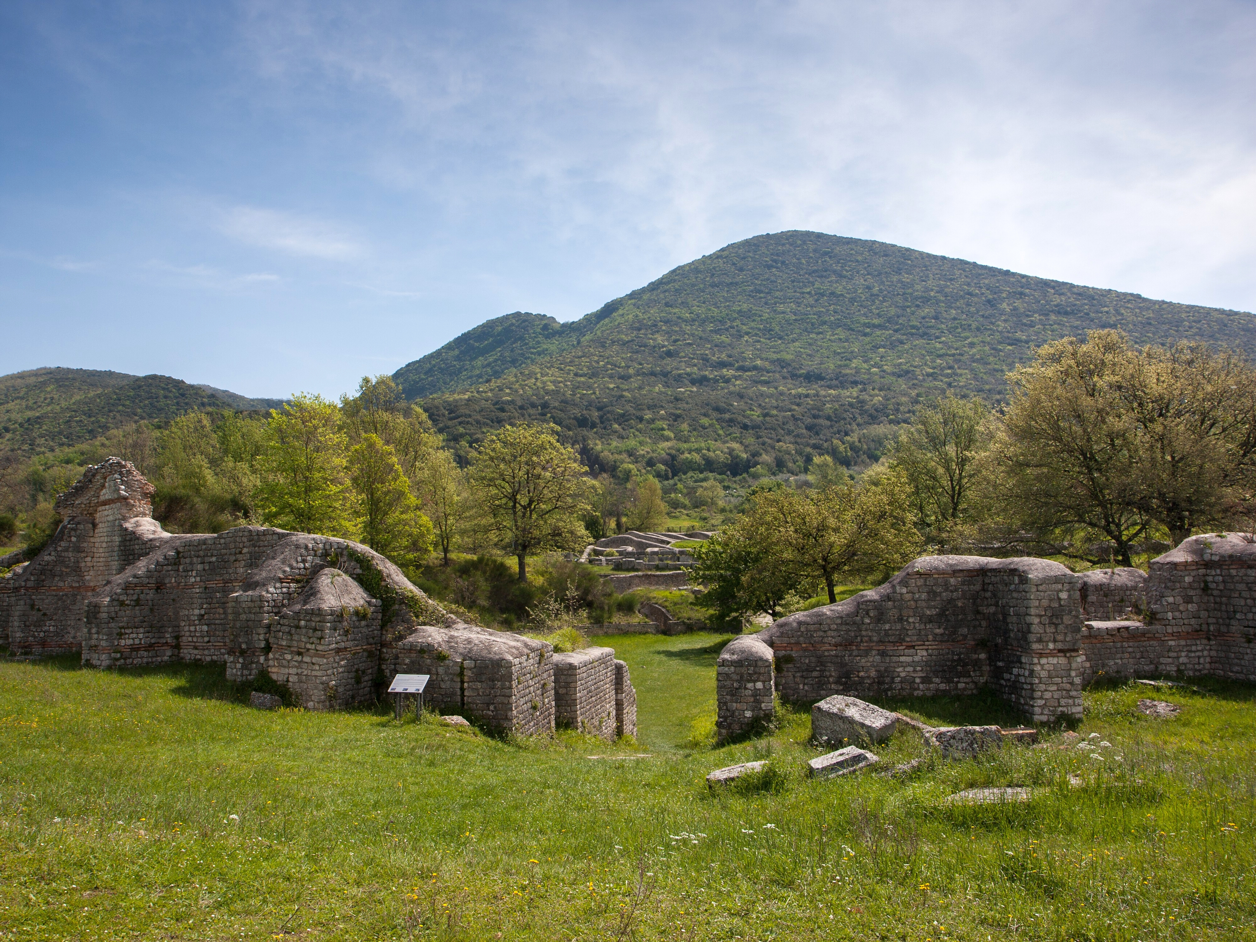 Area Archeologica di Carsulae - MIBAC This is a photo of a monument which is part of cultural heritage of Italy.